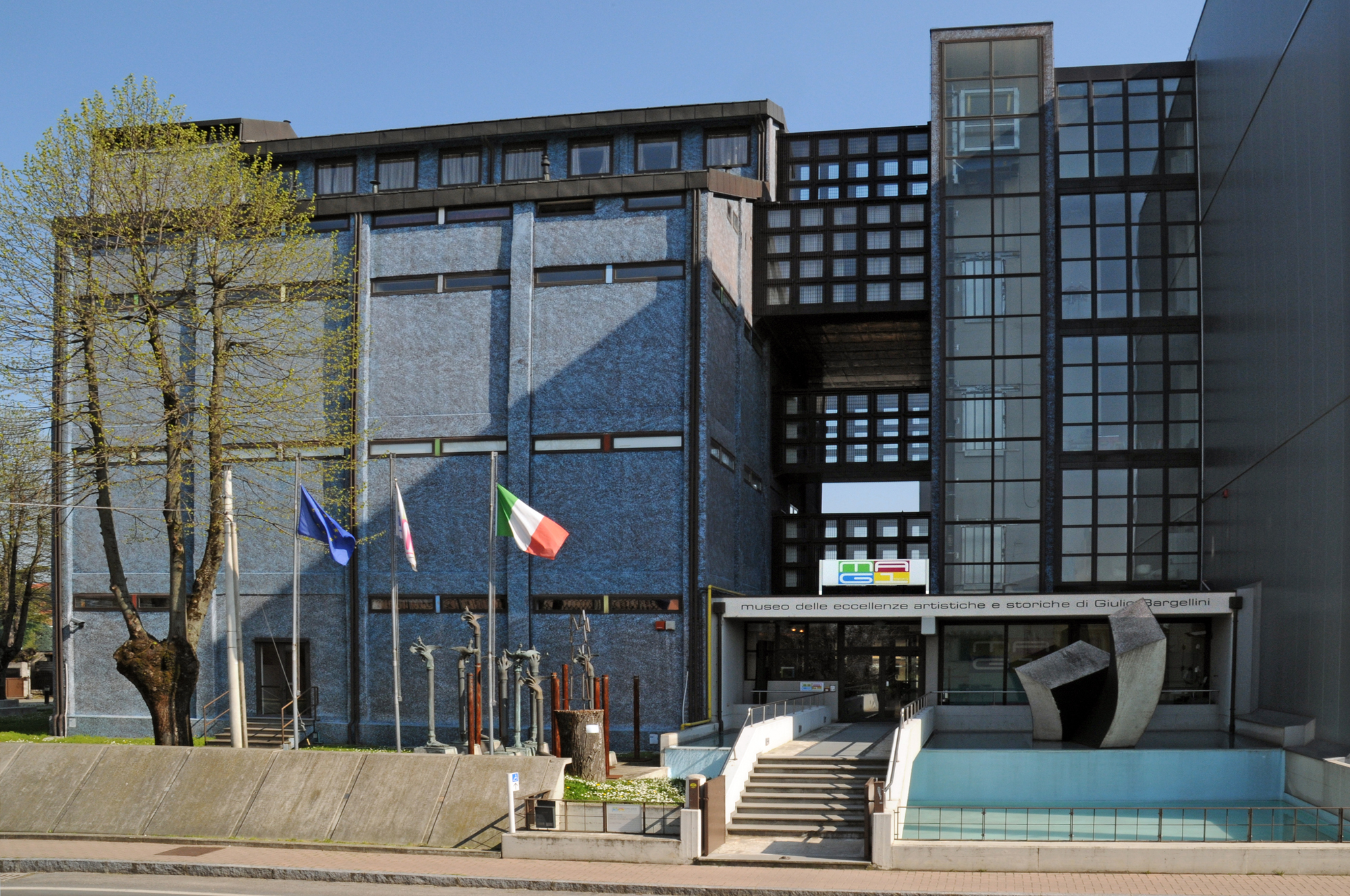 Ingresso principale del Magi '900 - museo delle eccellenze artistiche e storiche